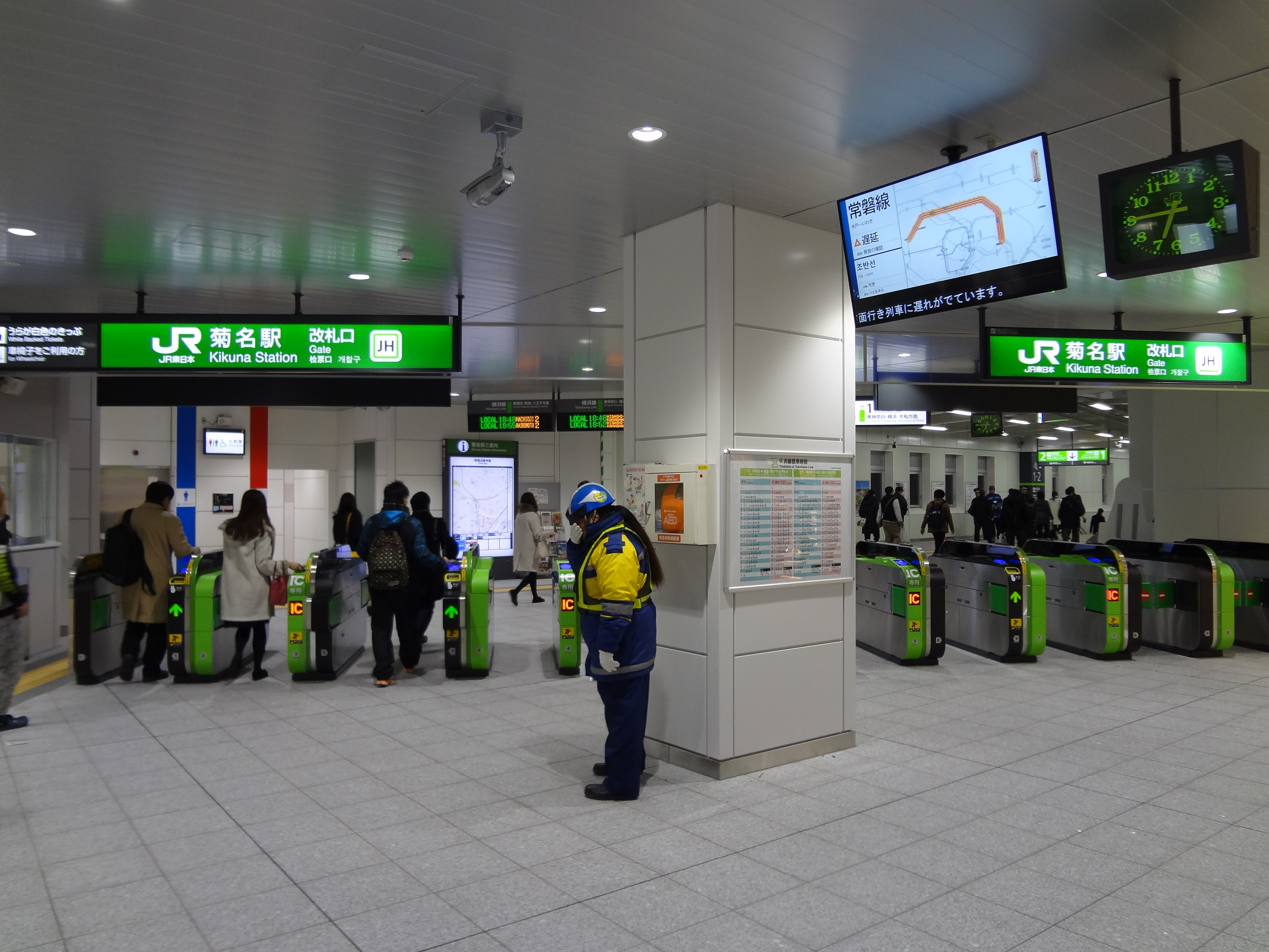 改札口（2017年12月18日）